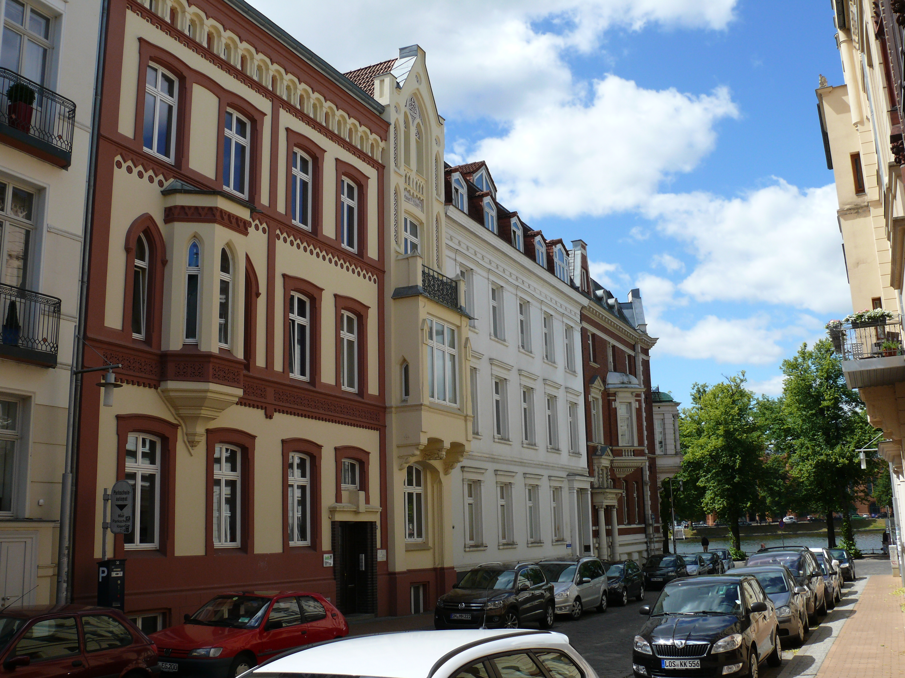 Die Gebäude "Körnerstraße 20 + 22" in Schwerin.